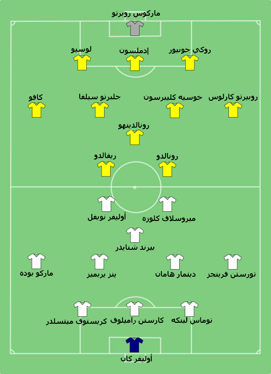 صورة توضح تشكيلة فريق ألمانيا و فريق البرازيل في المبارات النهائية لكأس العالم 2002